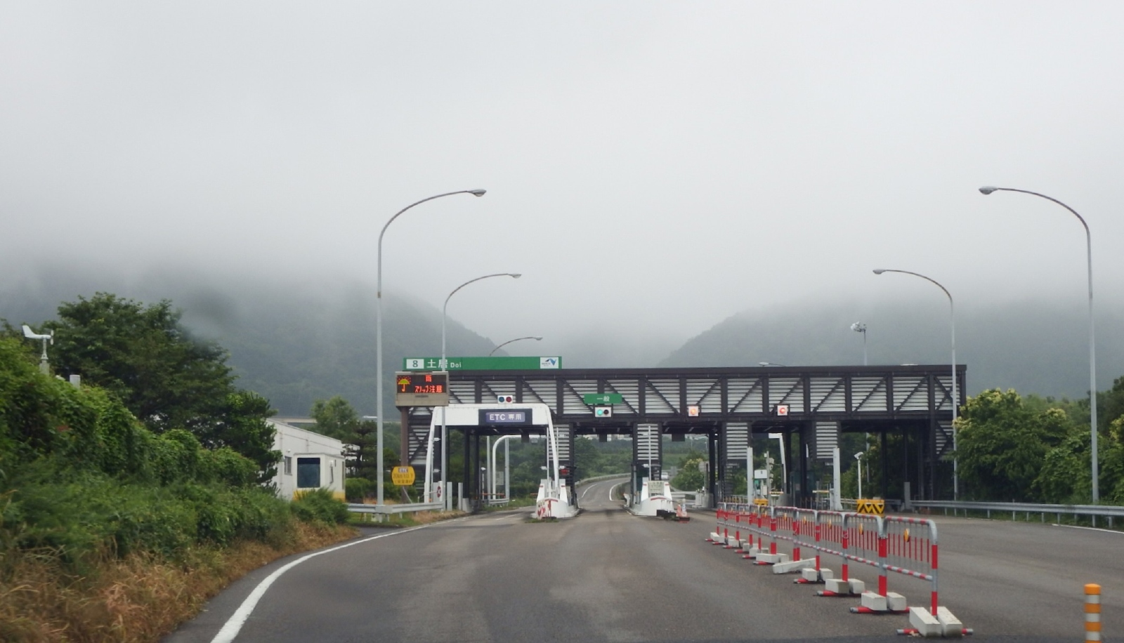 土居インターチェンジの入口